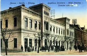 Hotel Central u Zemun